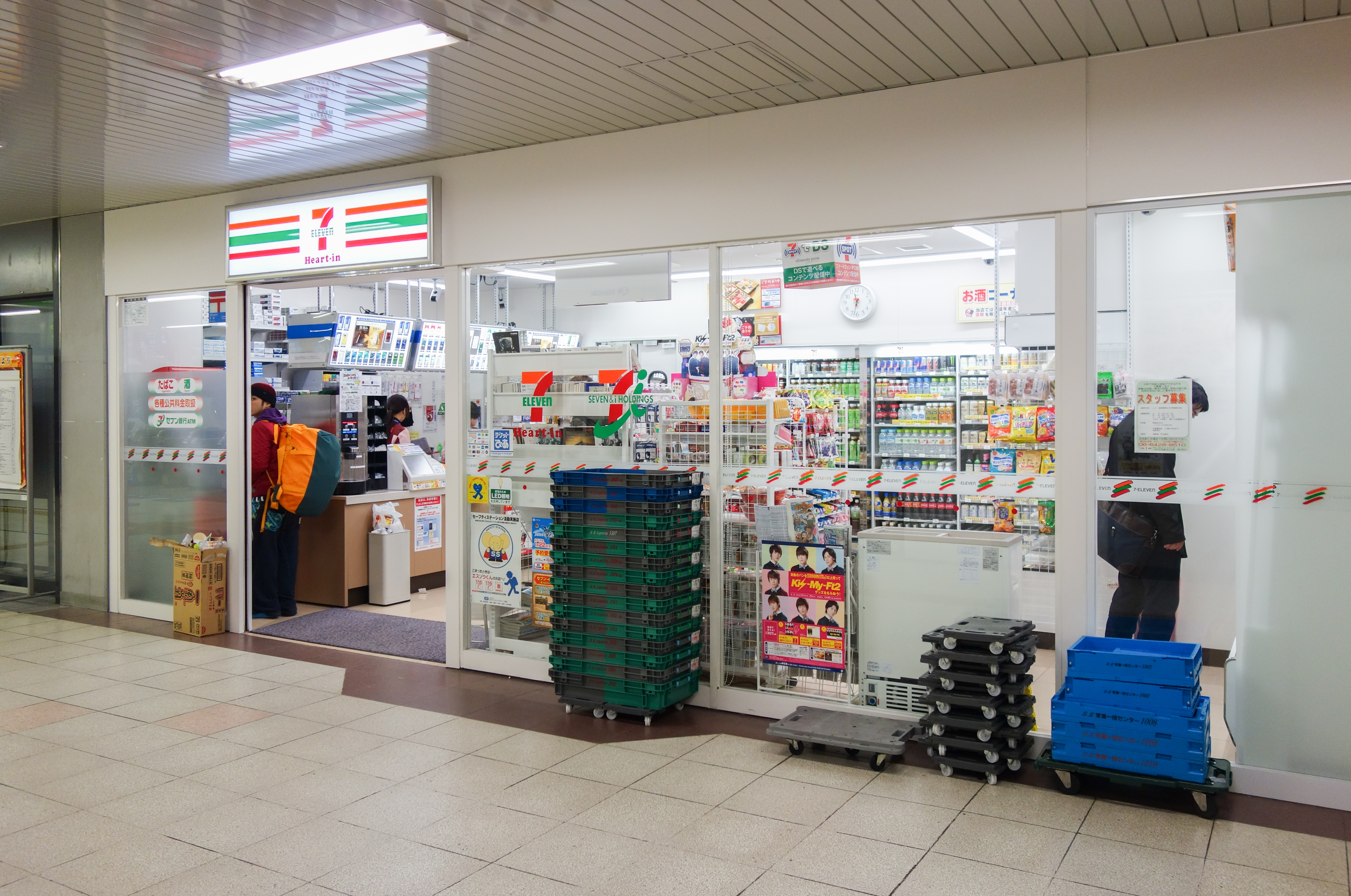 JR神戸線 立花駅 セブン-イレブン ハートイン JR立花駅北口店